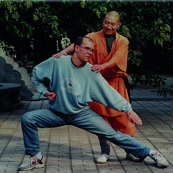 Bernhard Moestl mit Meister Shi De Cheng in Shaolin 1996